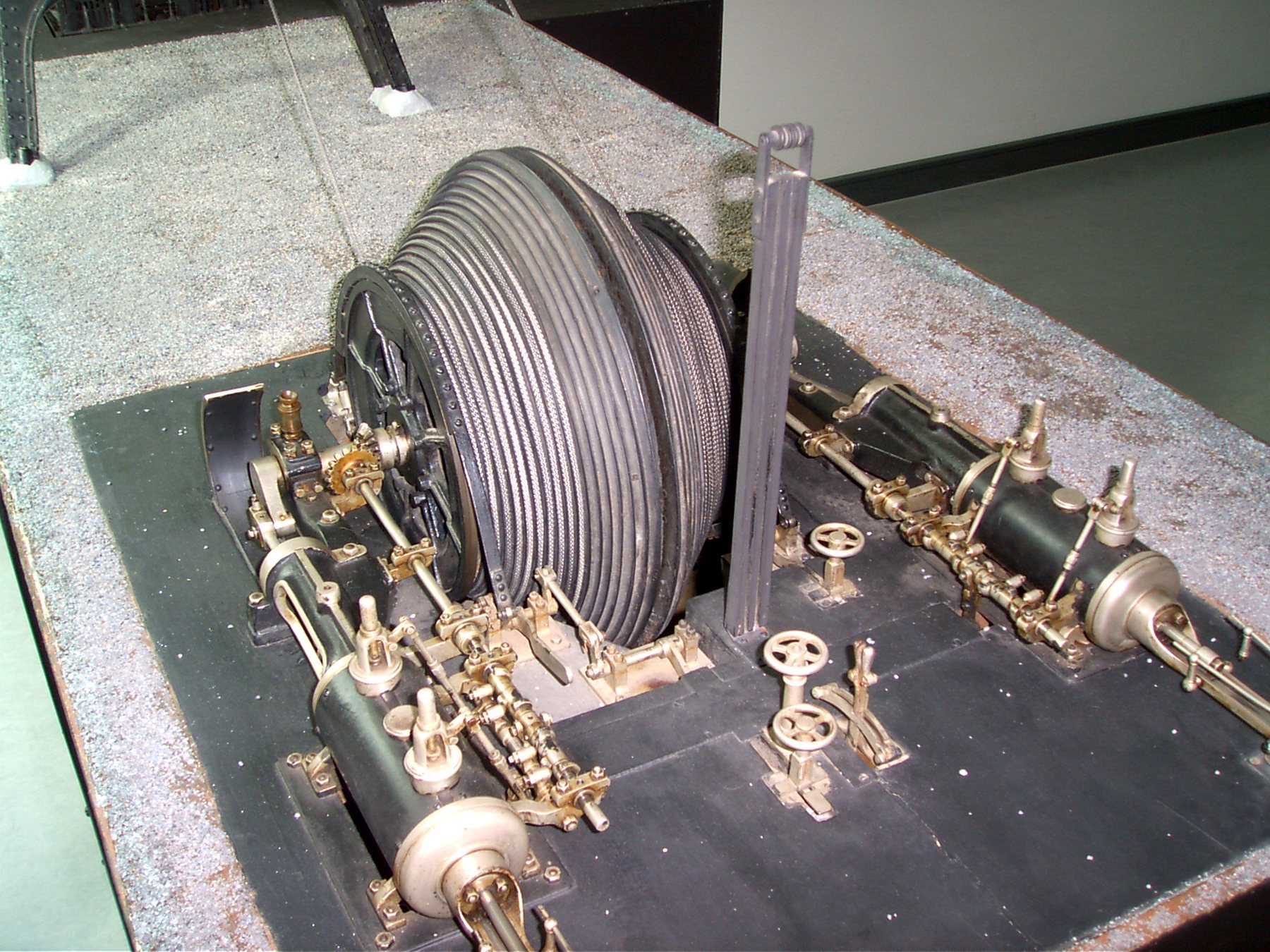 Modell der Spiralkorbfördermaschine des Bürgerschachtes 2 der Zwickauer Bürgergewerkschaft. Zwickau, Sachsen, Deutschland.